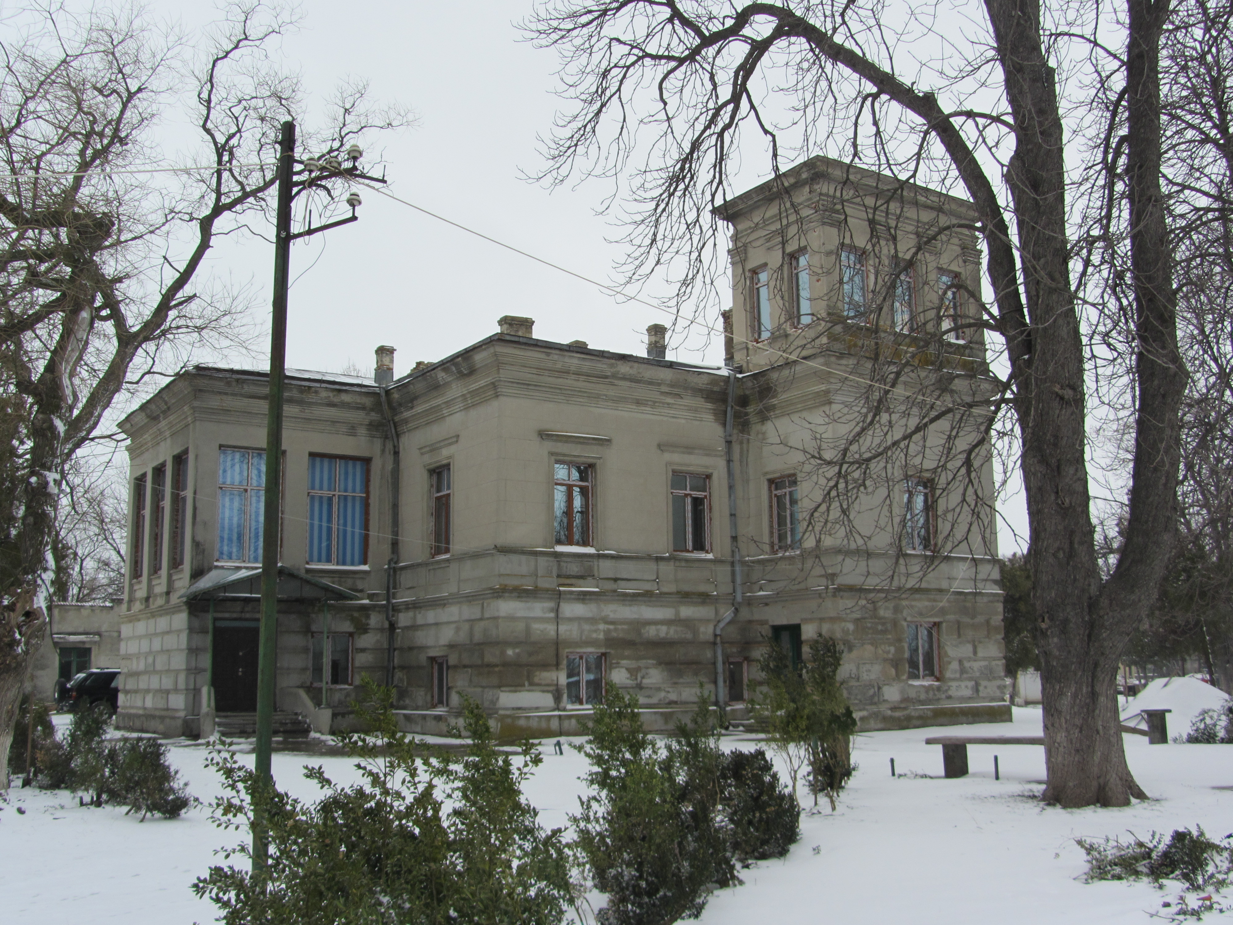 GR-II-m-B-14986, Conacul Djuvara - Floresti